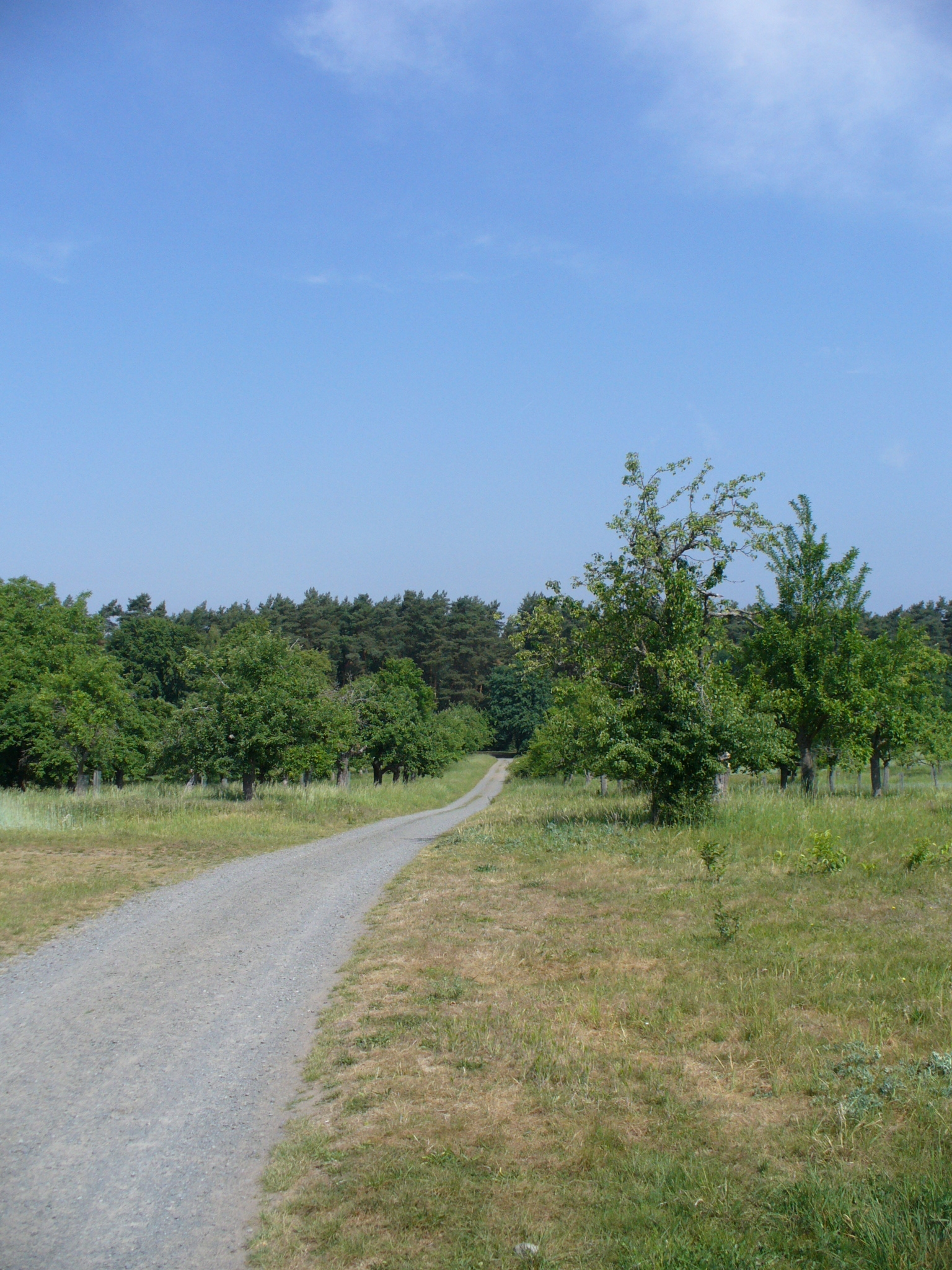 Vom höchsten Punkt der Terrasse T3 auf die Terrasse T2 Richtung Dietesheim